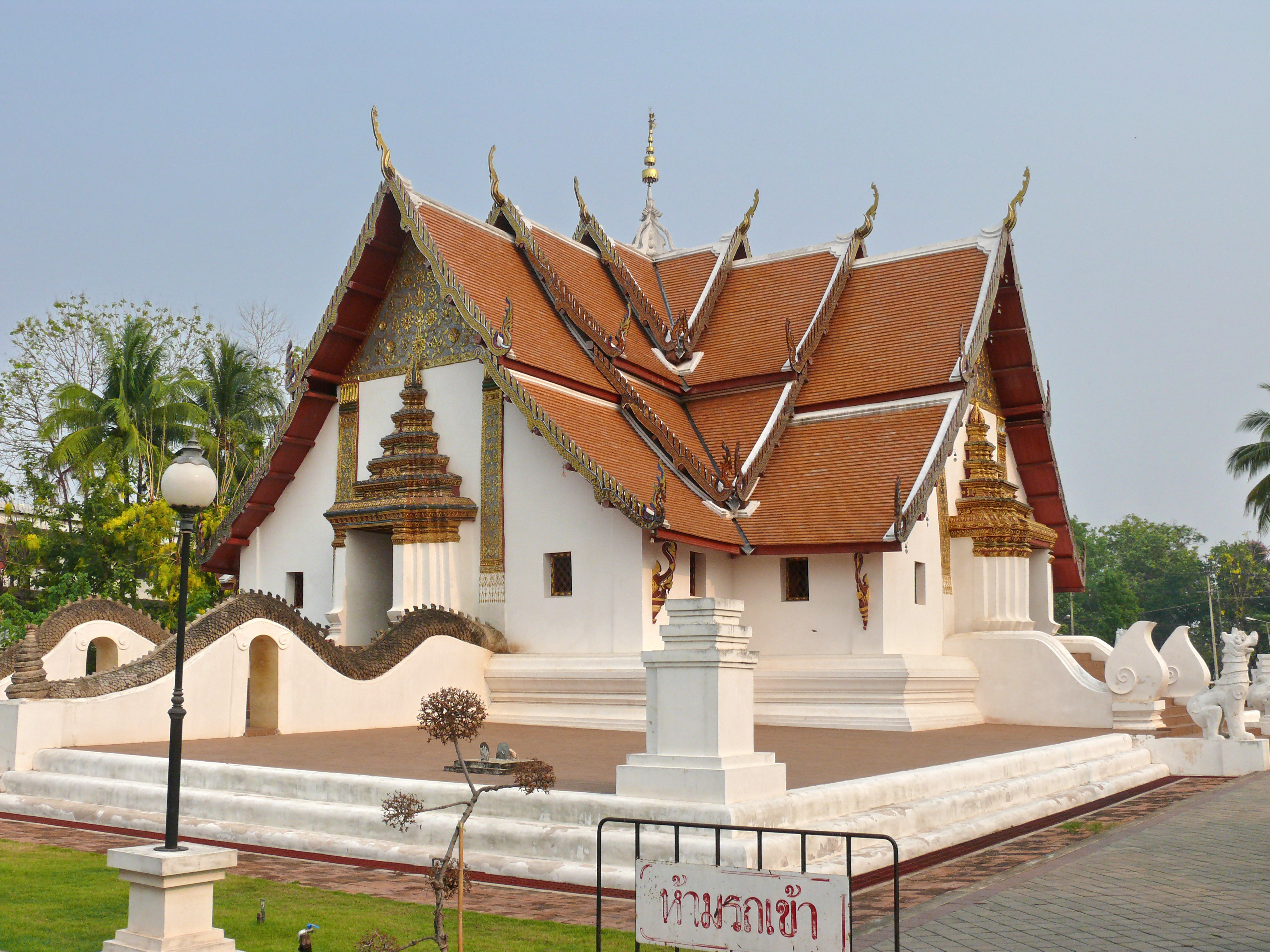 Wat_Phumin,_Nan.jpg